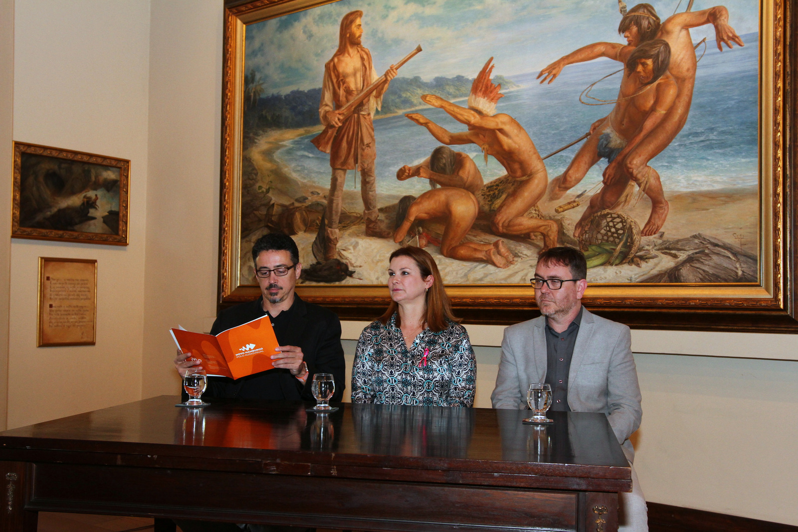 O Ministro da Cultura, Sérgio Sá Leitão, visitou, nesta segunda-feira (22), a Fundação Ernesto Frederico Scheffel, na cidade de Novo Hamburgo (RS). Na ocasião, o secretário Municipal de Cultura, Ralfe Cardoso, apresentou o plano de lançamento do Polo Audiovisual da cidade. Por meio da chamada pública de Coinvestimentos Regionais nº 01/2018, da Agência Nacional do Cinema (Ancine), a cidade receberá do Fundo Setorial Audiovisual (FSA) uma verba de R$ 5,65 milhões de reais, além de R$ 1,45 milhão da própria prefeitura. A Ancine é uma das entidades vinculadas ao Ministério da Cultura (MinC). O projeto tem como objetivo desenvolver atividades relacionadas ao audiovisual na região, dentro de cinco eixos de atuação: profissionalização, responsabilidade sociocultural, formação de público, estabelecimento da rede audiovisual e fomento da atividade. Isso inclui um laboratório com espaço e equipamentos de alta qualidade, um centro de formação em parceria com a Fundação Cinema do Rio Grande do Sul (Fundacine), mostras e exibições abertas à comunidade e a abertura de editais para estimular as produções. "Novo Hamburgo está mudando a matriz econômica, de uma cidade de indústria de calçados para um polo audiovisual, buscando na economia criativa uma maneira de reinventar e estimular a cultura, além de gerar empregos e ter uma relevância no audiovisual não só em nível local, mas também estadual e até nacional", afirmou o ministro. 23/10/2018 O ministro da Cultura, Sérgio Sá Leitão; a prefeita de Novo Hamburgo, Fátima Daudt; e o secretário de Cultura, Ralfe Cardoso, durante apresentação do plano de lançamento de Polo Audiovisual Fotos: Ronaldo Caldas/Ascom/MinC